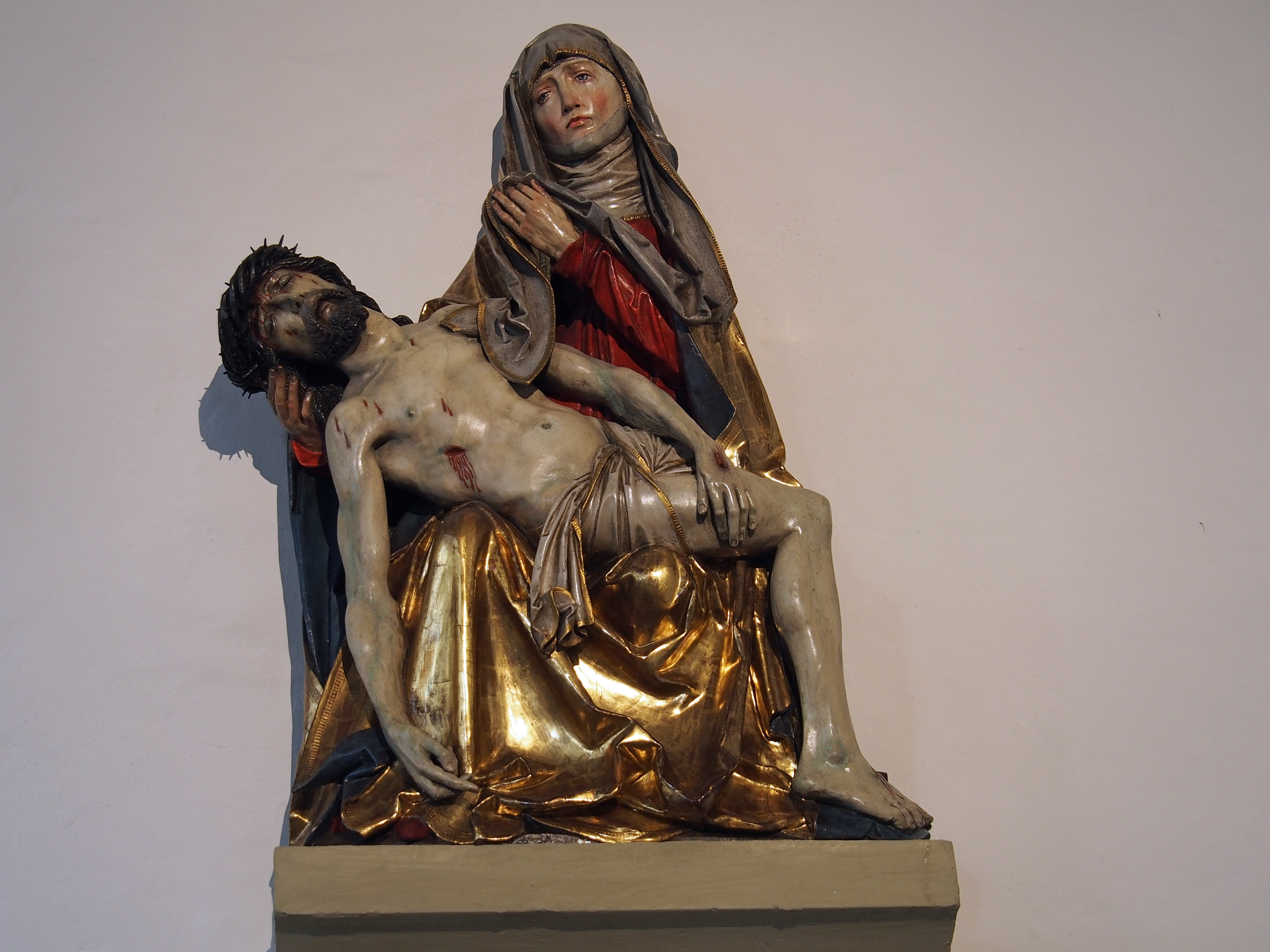 Pietà in der Franziskanerkirche Würzburg. Aus der Werkstatt Tilman Riemenschneiders (um 1510)